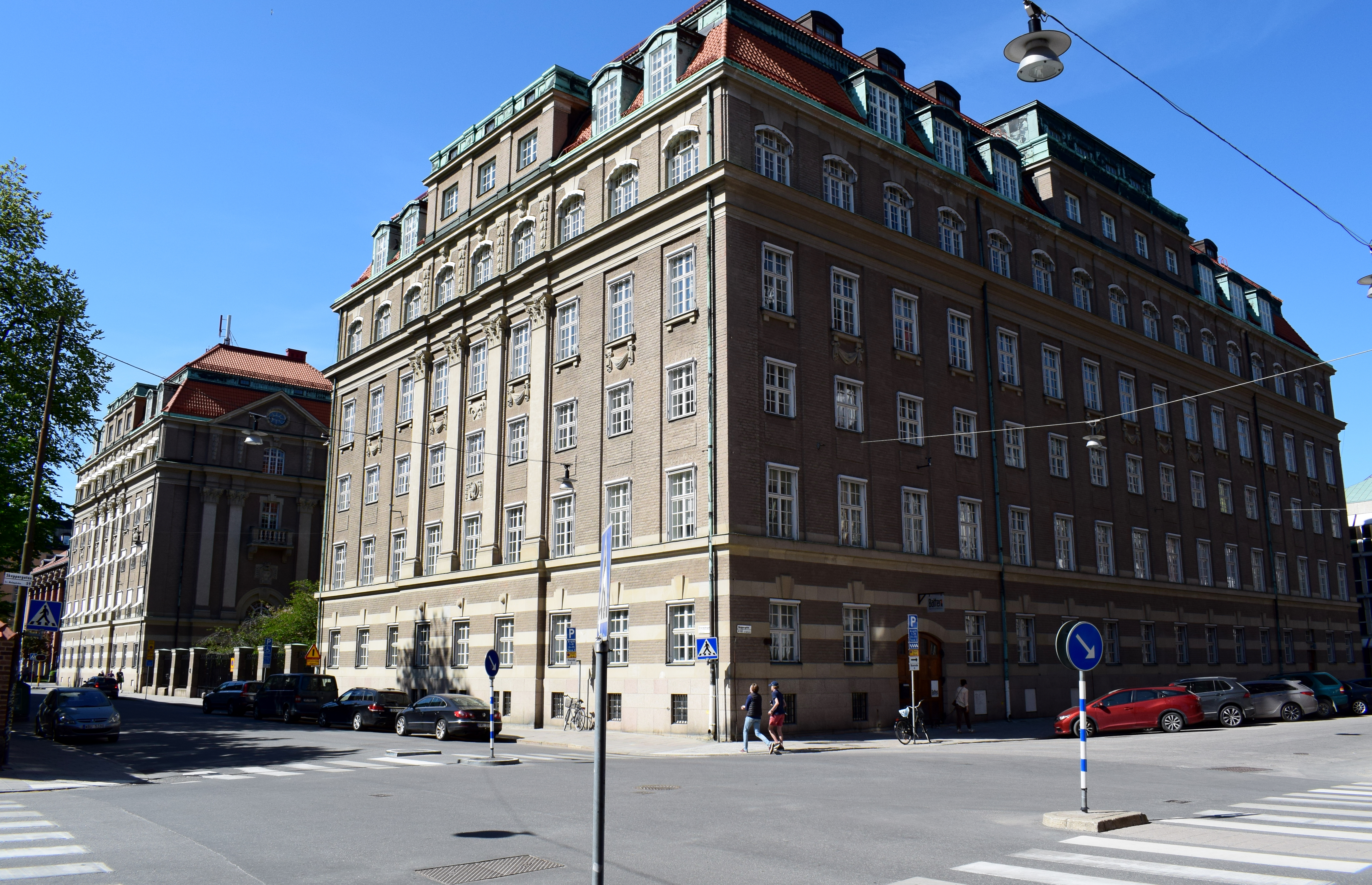 Östermalmsgatan 87, Gamla militärstabsbyggnaden (GMSB) eller Grå huset. Stabsplats för Försvarsstaben och Arméstaben åren 1937–1981.